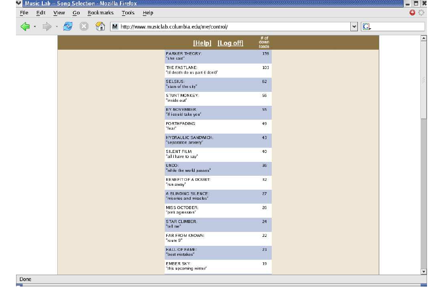 תצוגת השירים בעמודה אחת